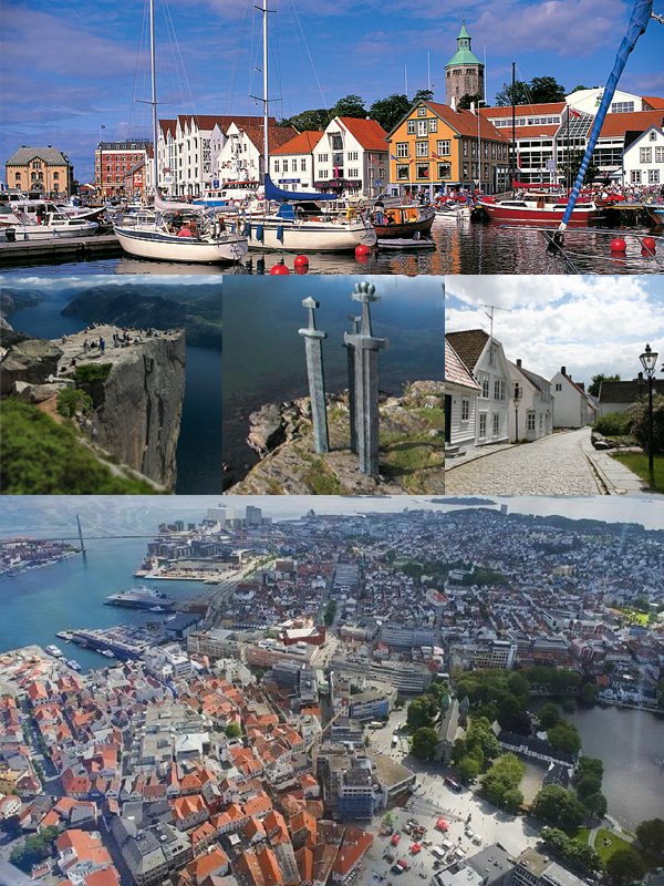 Gamle Stavanger (Old Stavanger) Edited version of Image:Vaagen.jpg